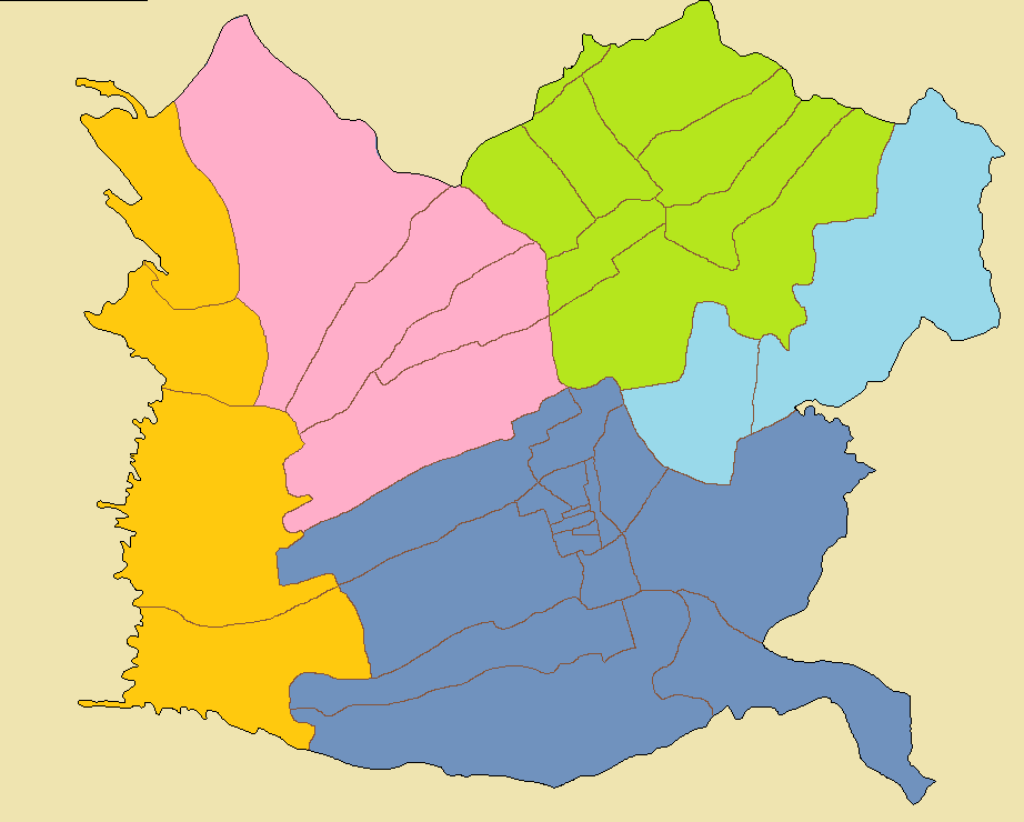 中文（台灣）: 南投市分區地圖 ██ 南崗地區 ██ 中興地區 ██ 軍功寮地區 ██ 南投地區 ██ 八卦台地地區